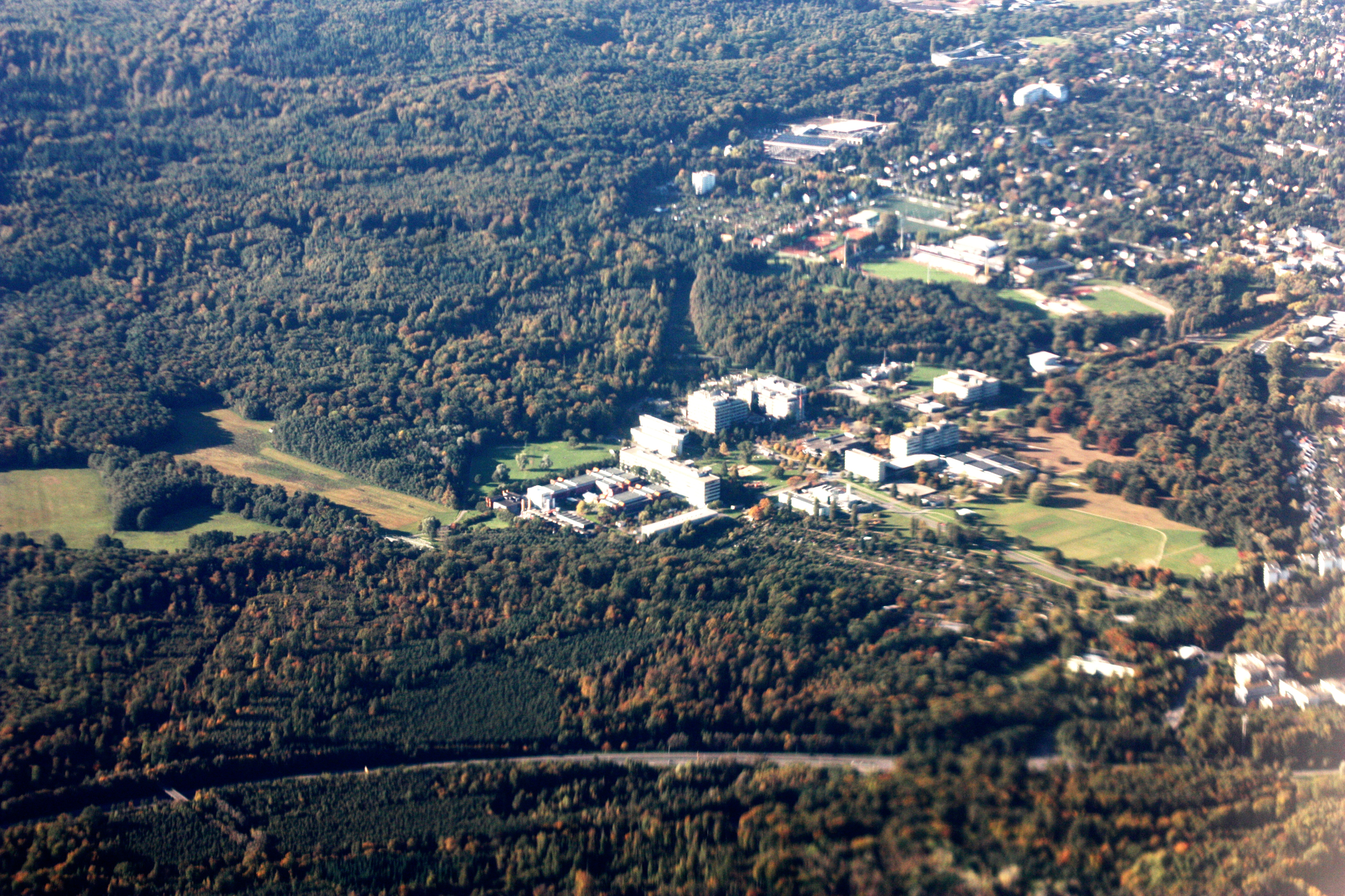 1 Flug von Frankfurt/Main nach Sofia; Start 10:12 MEZ; Landung 13:06 MEZ; Oktober 2010; TU Darmstadt, Campus Lichtwiese; Die Lichtwiese liegt im Südosten der Darmstädter Kernstadt zwischen Nieder-Ramstädter Straße und Bahndamm der Odenwaldbahn.